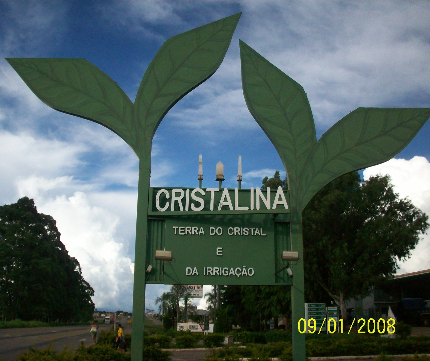 foto da entrada de cristalina na br050, tirado por clodoaldo o. lemes